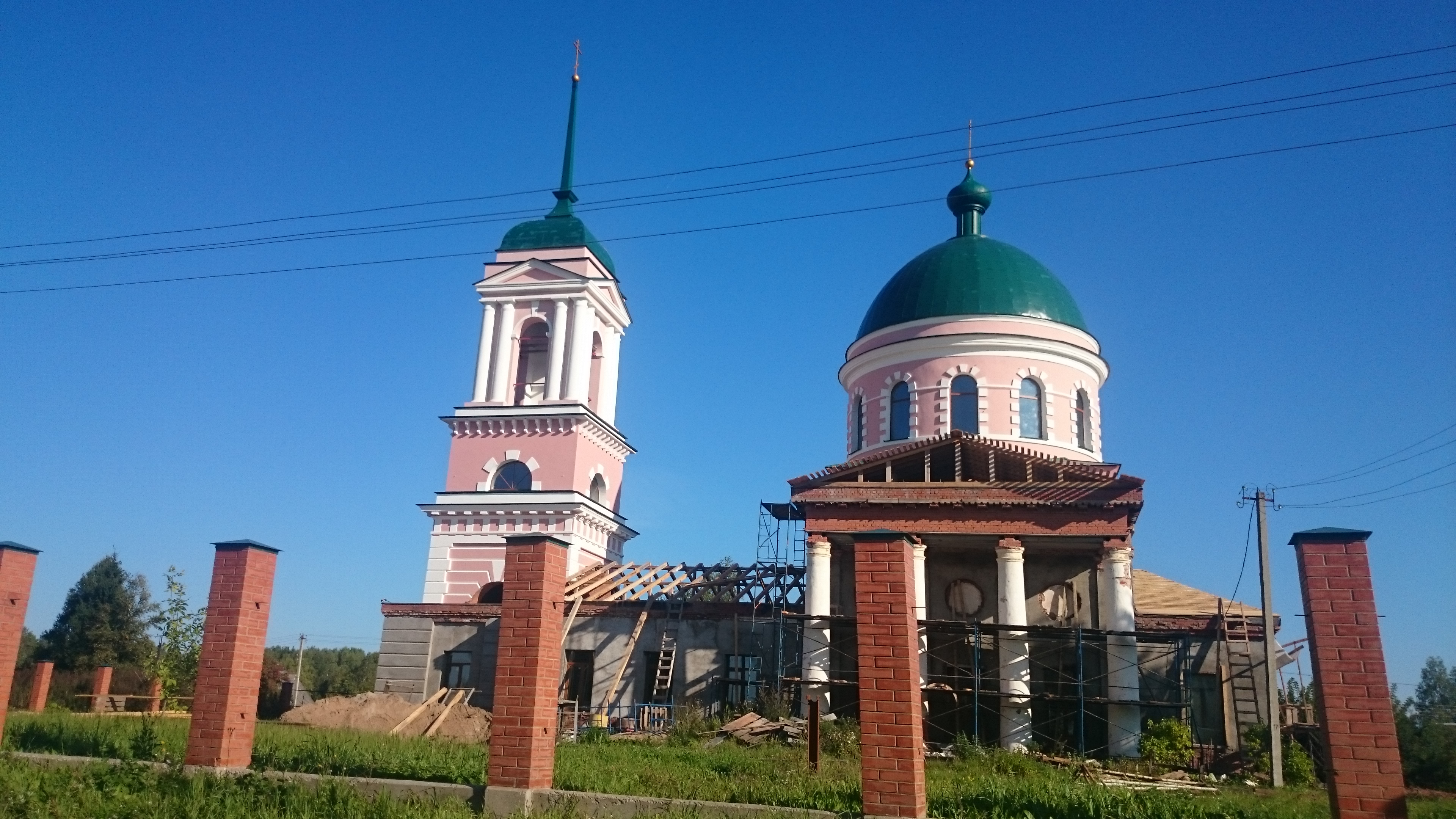 Церковь Уверения Фомы в Воскресении Христовом